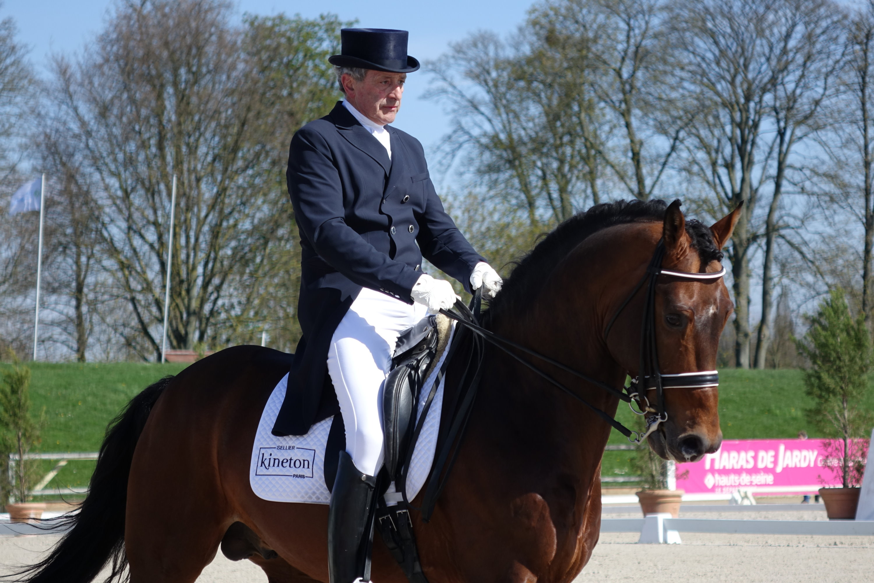 Philippe Limousin et Rock'N Roll Star au Grand National Dressage 2016, Haras de Jardy, Hauts-de-Seine, France